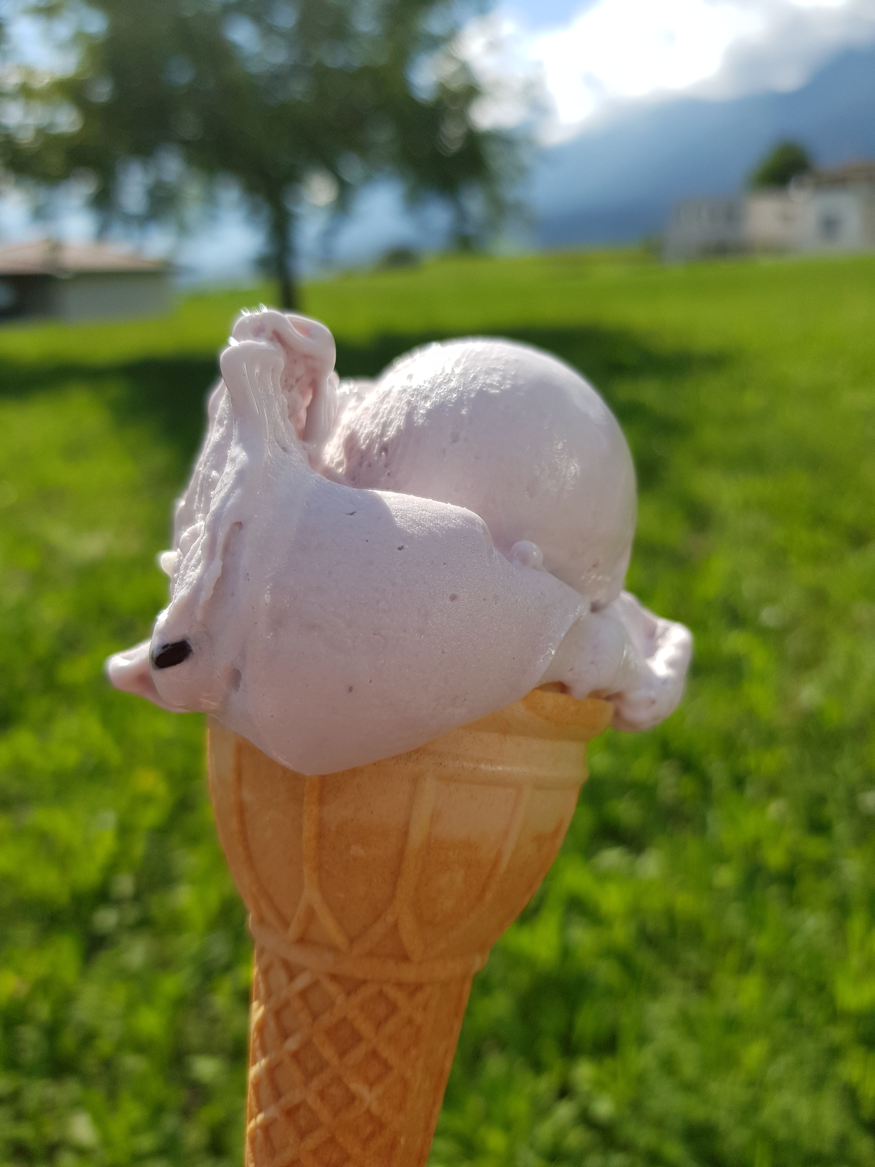 Veilcheneis von der Konditorei Fuchs in Absam, Tirol